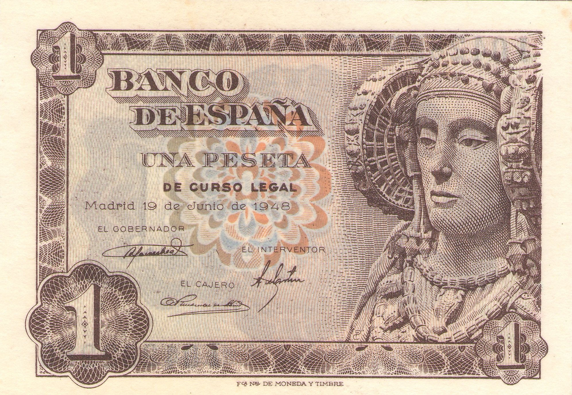 Billete de una peseta del 19 de junio de 1948. Anverso.